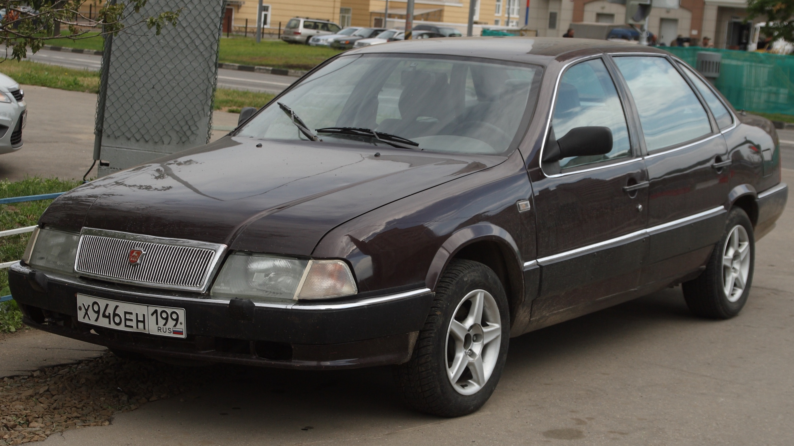 «Волга» ГАЗ-3105.